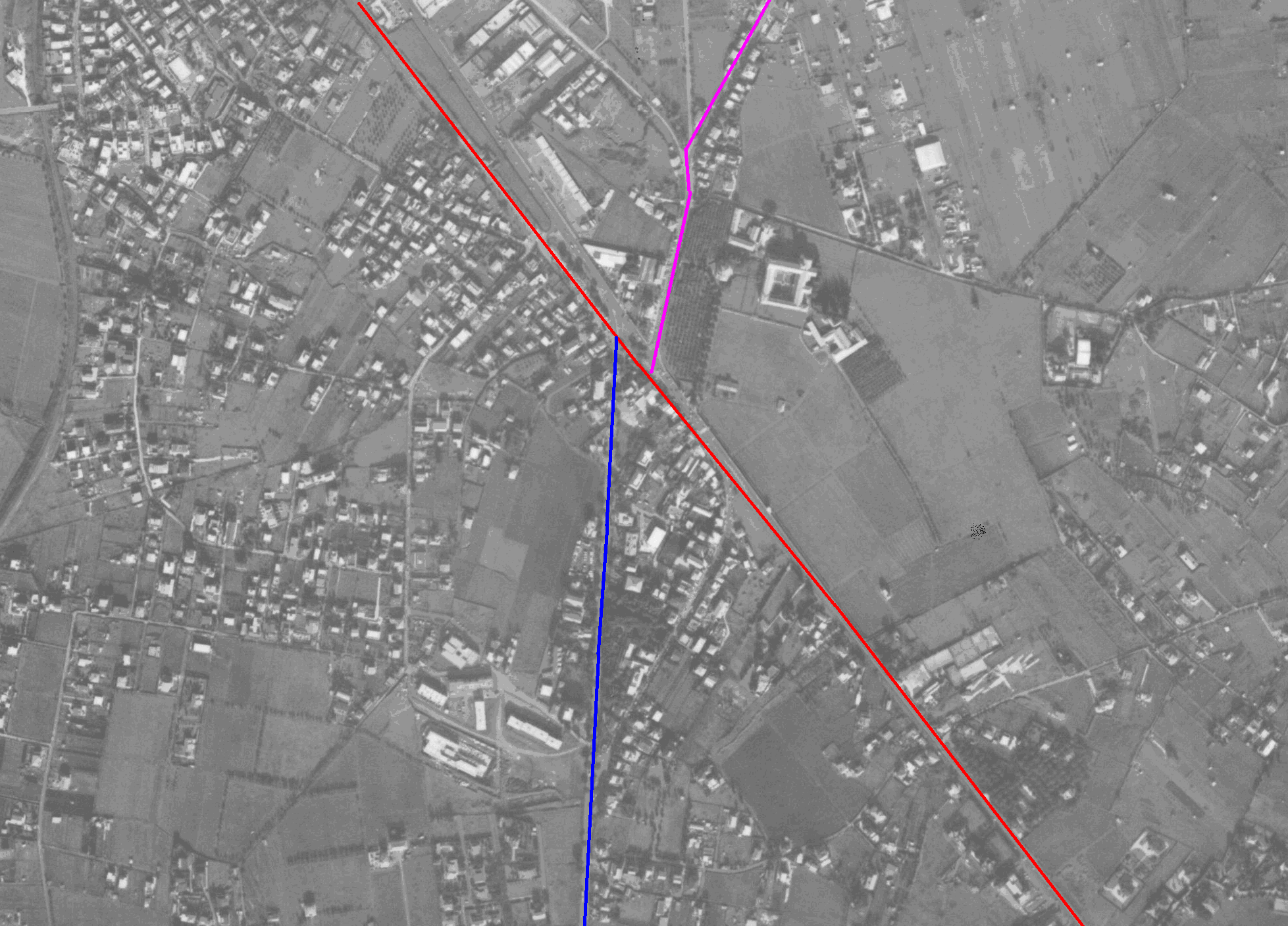 Frattocche di Marino